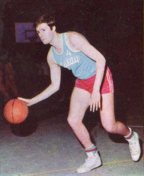 CAMPIONI dello SPORT 1966/67-Figurina n.320- GIOMO - PALLACANESTRO -Rec